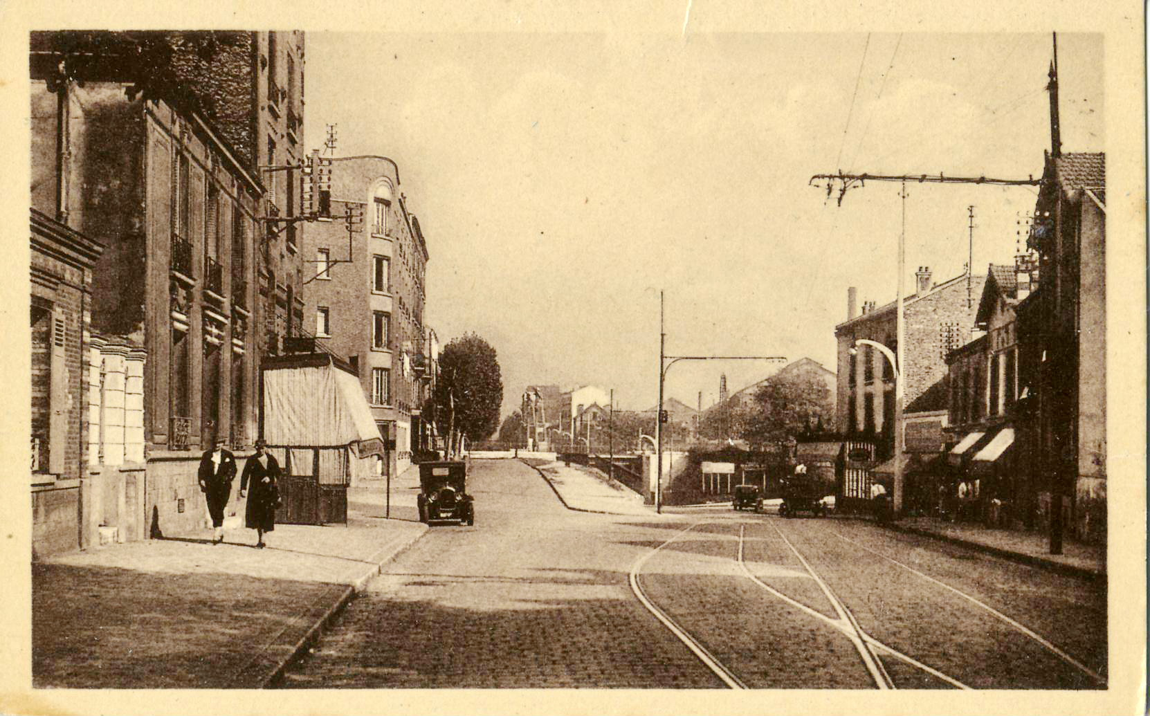 Carte postale ancienne éditée par Le Mollé CIM :LA COURNEUVE - Boulevard Pasteur